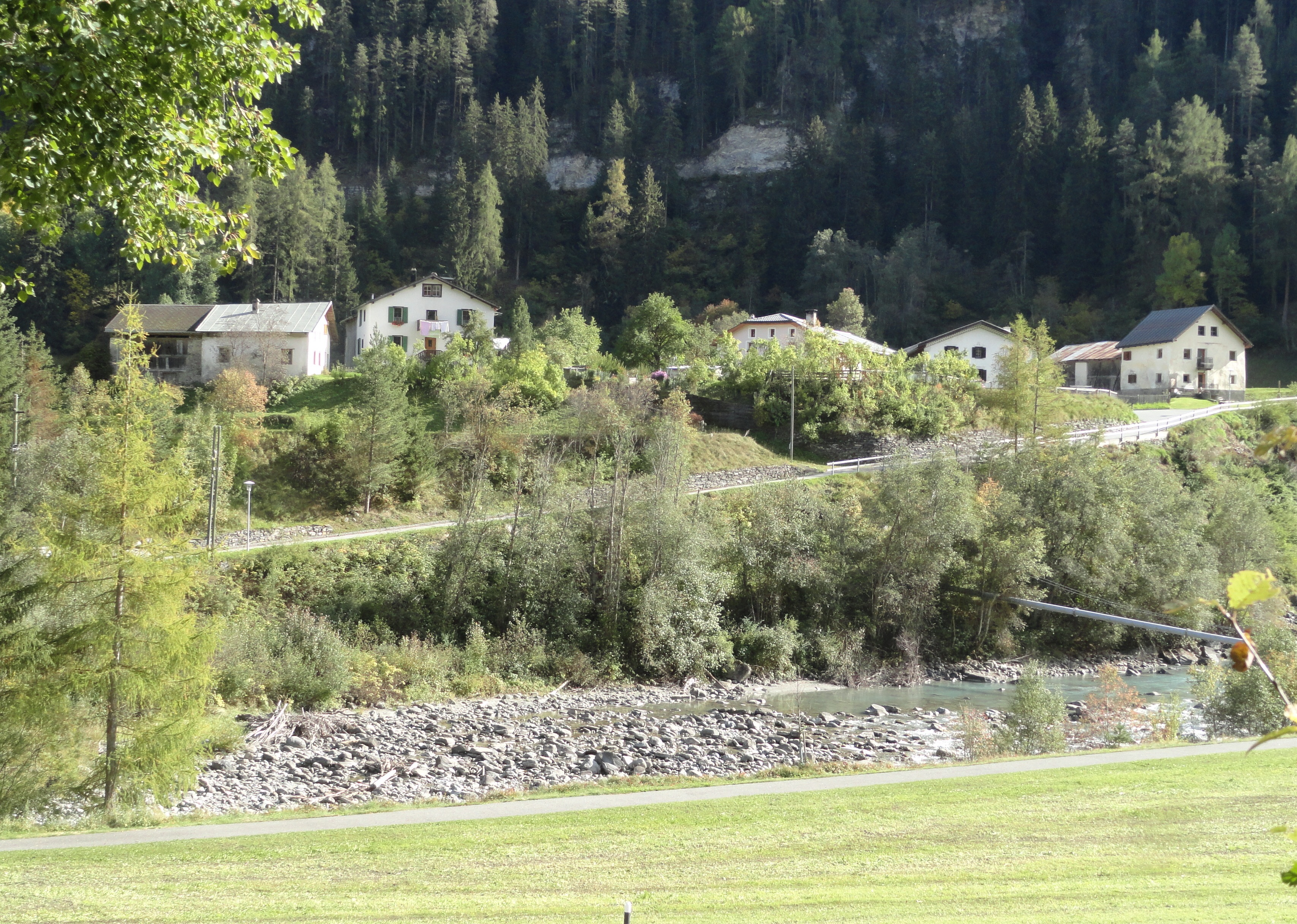 Die Siedlung Sclamischot (politisch: Tschlin) von der anderen Seite des Inns her gesehen